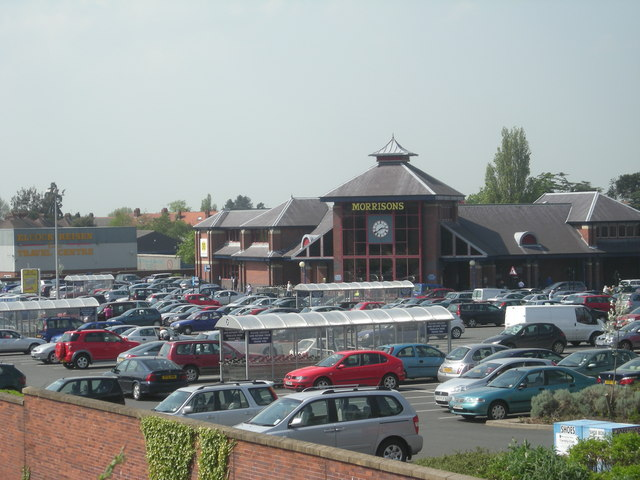 Morrisons Supermarket & car park